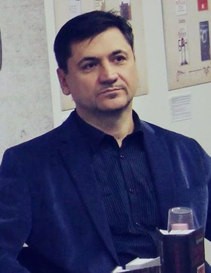 Dragan Jakovljević